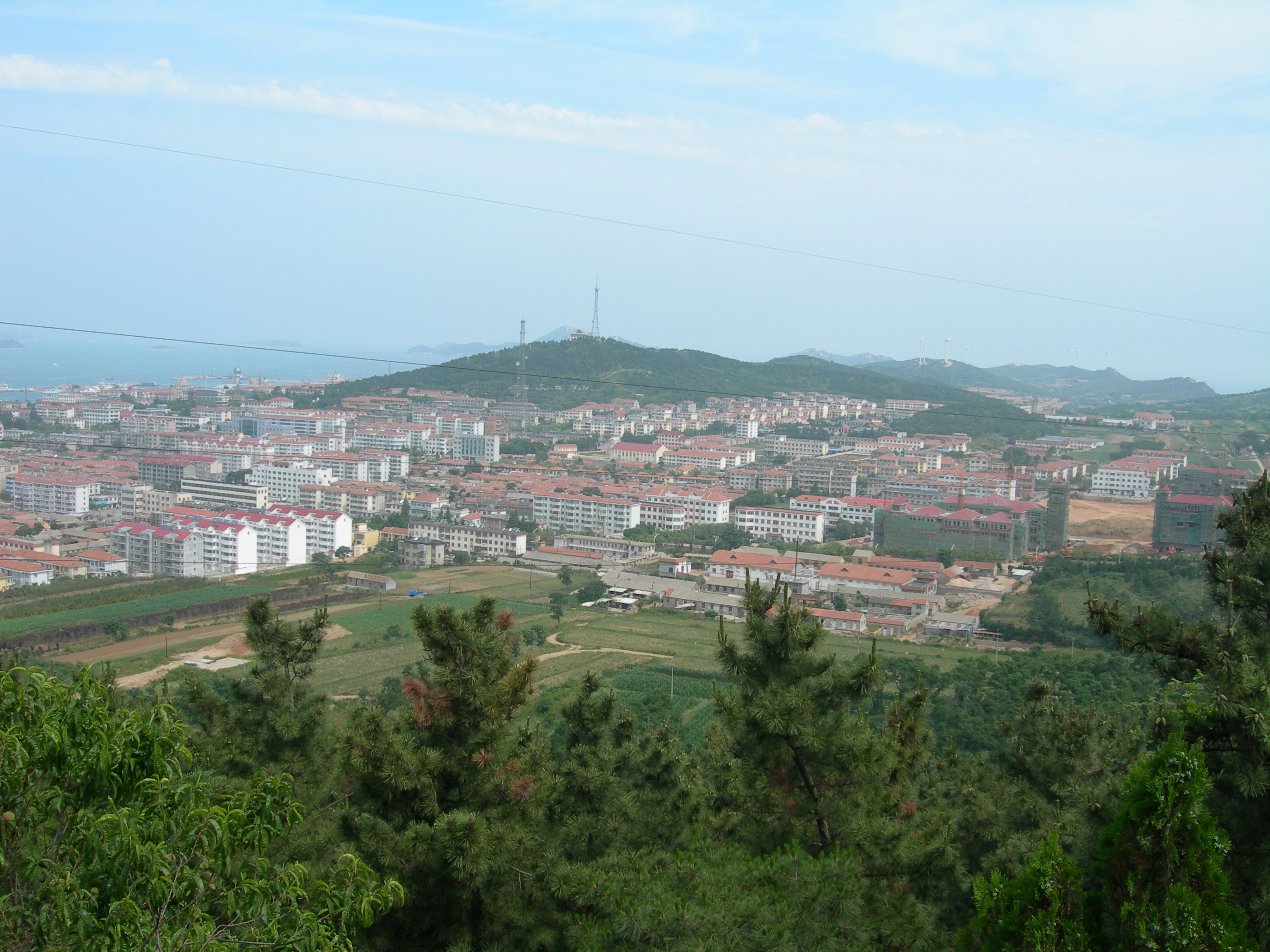 烟台长岛-南长山岛